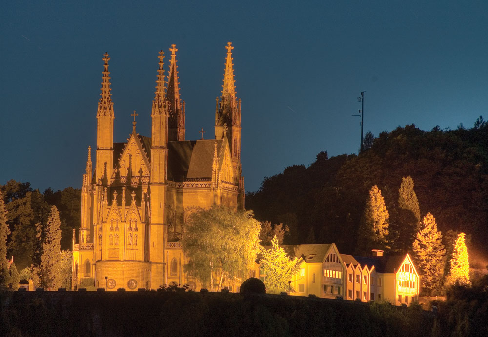 HDRI der Apollinariskirche in Remagen